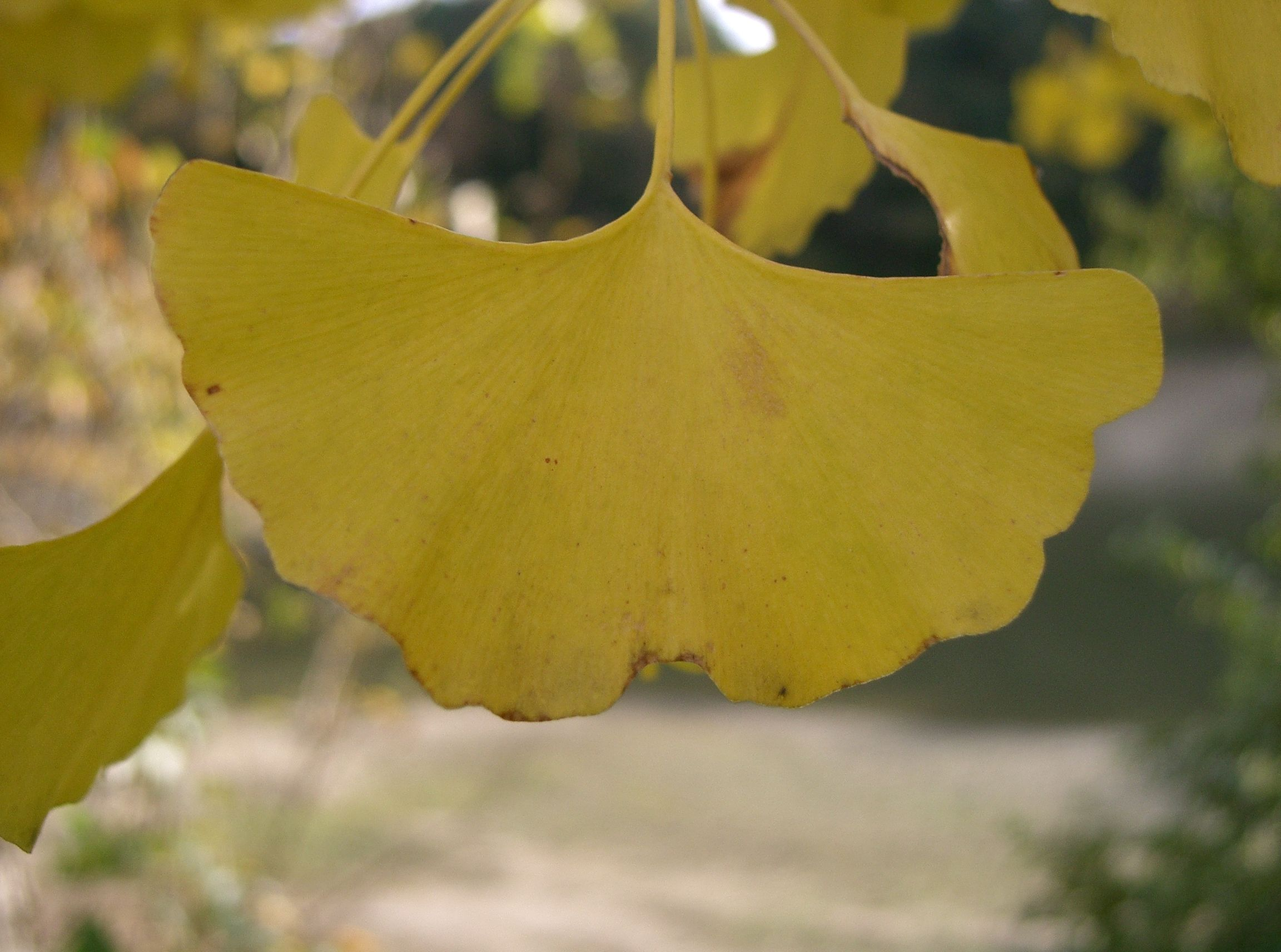 Gingko biloba